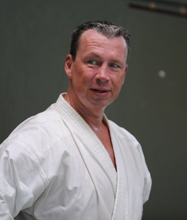 Ralf Brachmann, ehemaliger Vizeweltmeister im Karate, Hessischer Landestrainer und Sportfunktionär